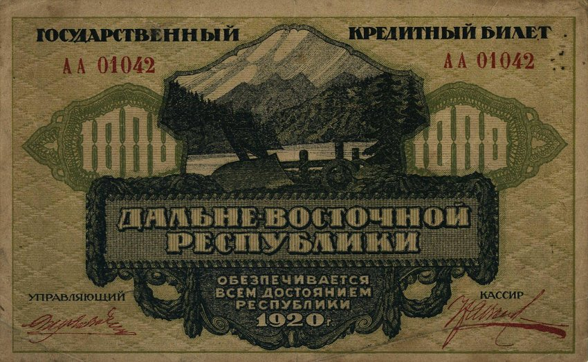 Государственный кредитный билет ДВР 1000 рублей 1920. Аверс.